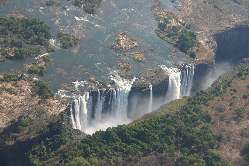 Victoria Falls